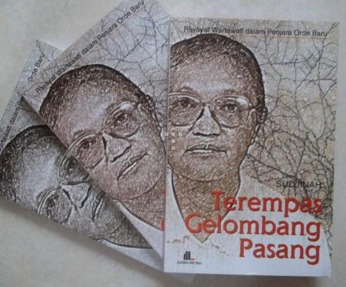 Sudjinah Gerwani